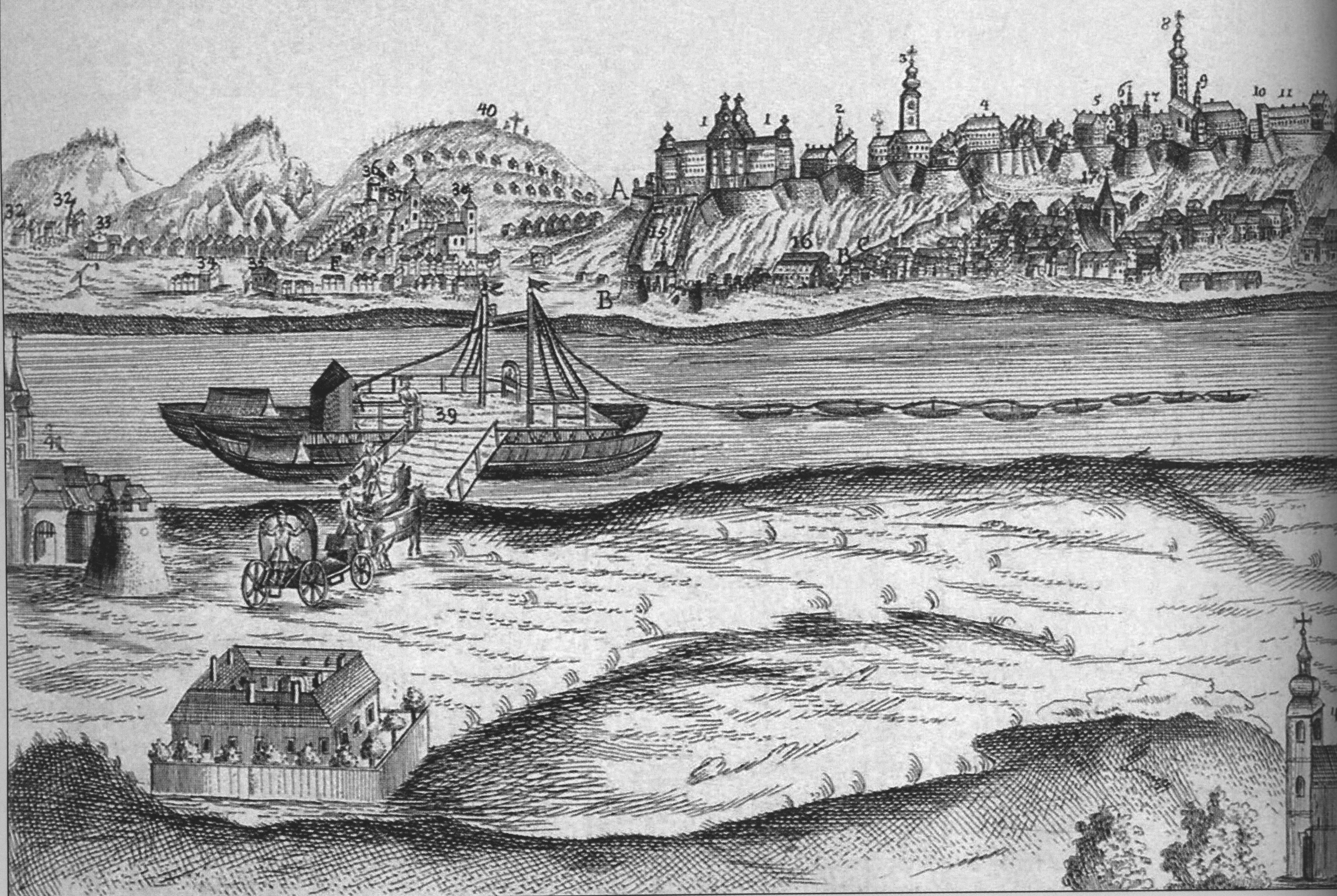 A Pestet és Budát összekötő repülőhíd képe. Binder János Fülöp vegyes technikával készült rajzának részlete. Pozsony, 1735. Reaction ferry between Pest and Buda. Drawing detail by Fülöp Binder János (Bratislava, 1735)